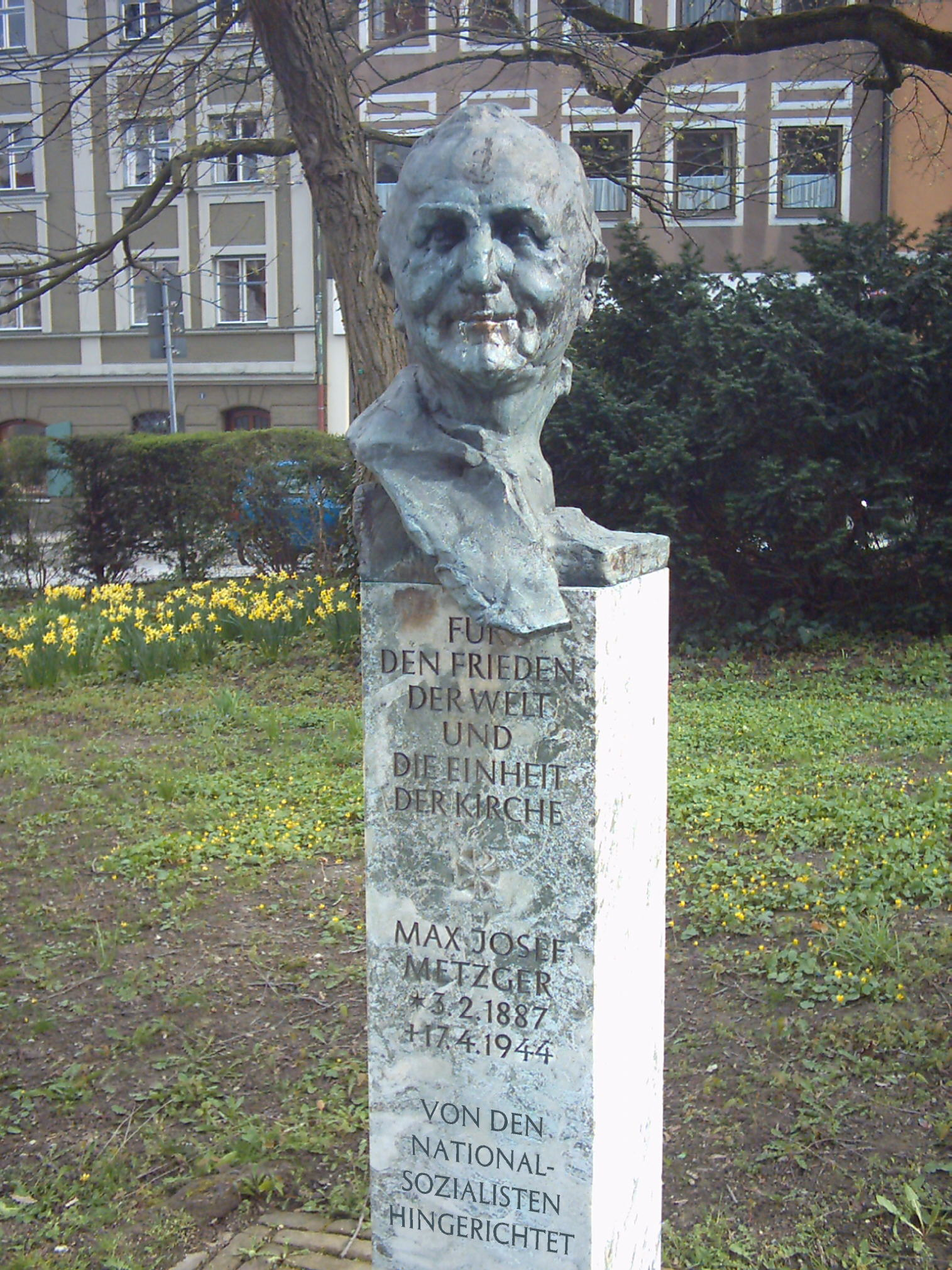 Der untere Teil der Inschrift "von den Nationalsozialisten hingerichtet" ist an der linken Seite der Stele. Der Autor hat den Text dorthin platziert, wo er sein sollte.